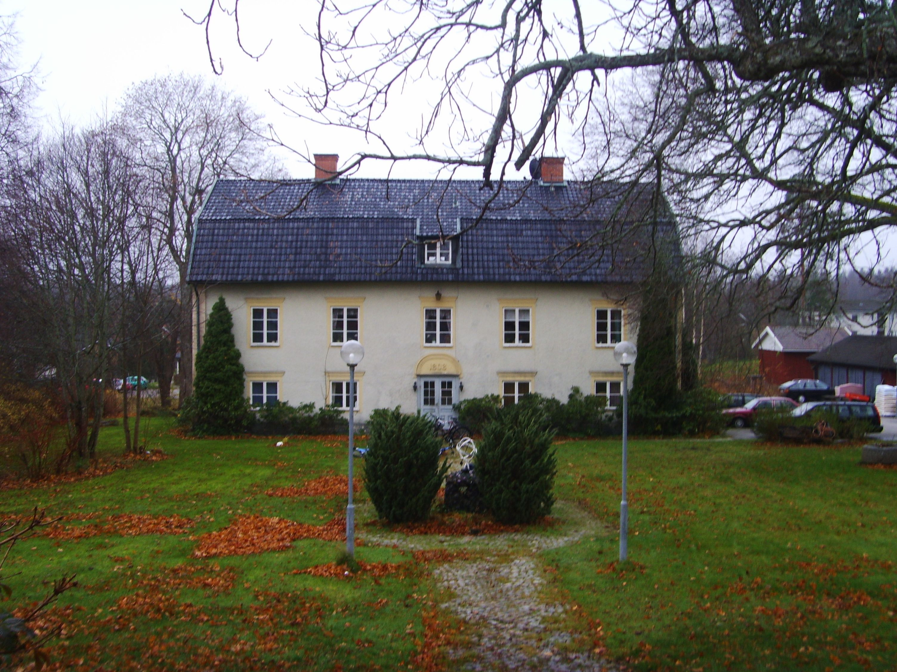 Bruksgården (uppförd 1811 av byggmästare Kiallus Mats Jonsson från Mora) med Östra flygeln (uppförd 1811) och Västra flygeln (uppförd 1812), invid "Reijmyre glasbruk", var länge bostad åt ägarna till glasbruket i Rejmyre.